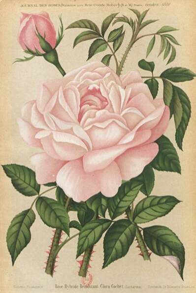 Hybride remontant 'Clara Cochet' (Lacharme 1886), in Journal des roses octobre 1886.